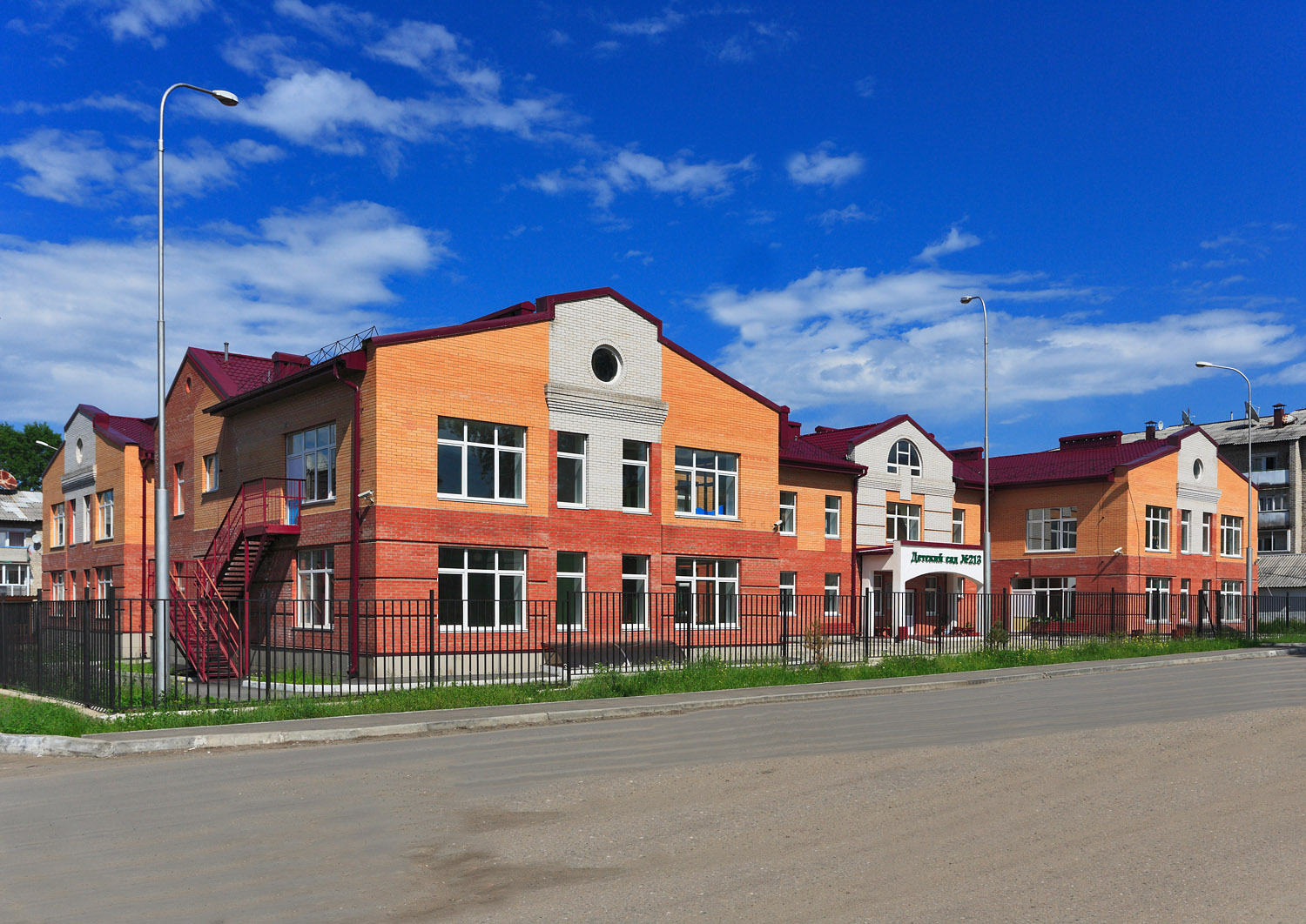 Строительство детского сада № 213 г.Слюдянка Иркутской области